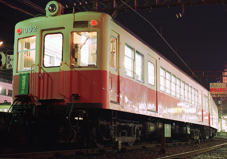 高松琴平電鉄 10000形1002+1001